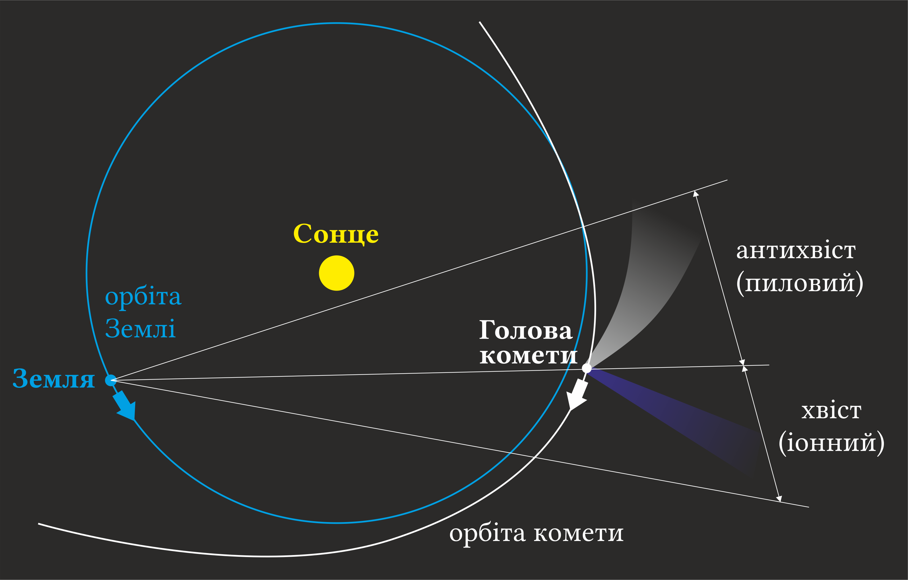 Схема утворення хвостів комети